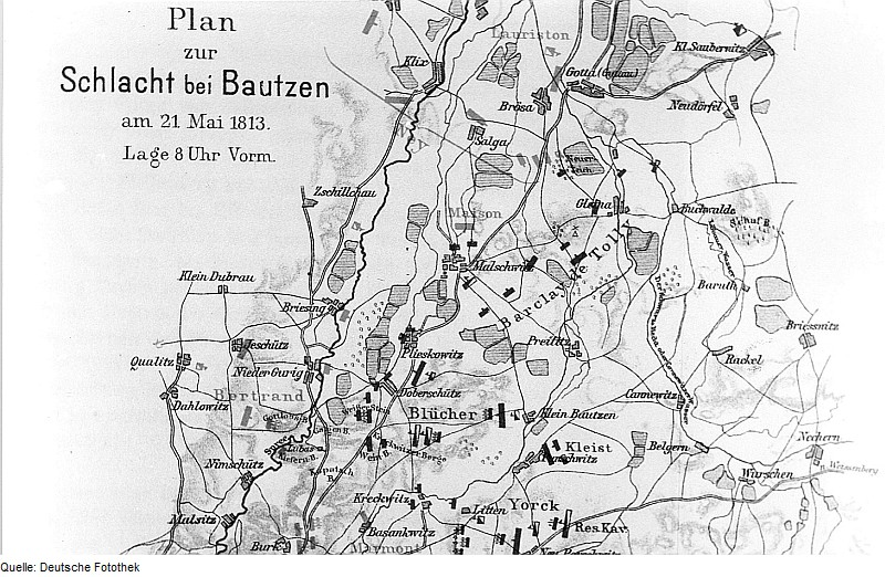 Original image description from the Deutsche Fotothek Malschwitz-Gleina. Plan zur Schlacht bei Bautzen am 21.5.1813, aus: Friedrich, Rudolf: Die Befreiungskriege 1813-1815, 1912